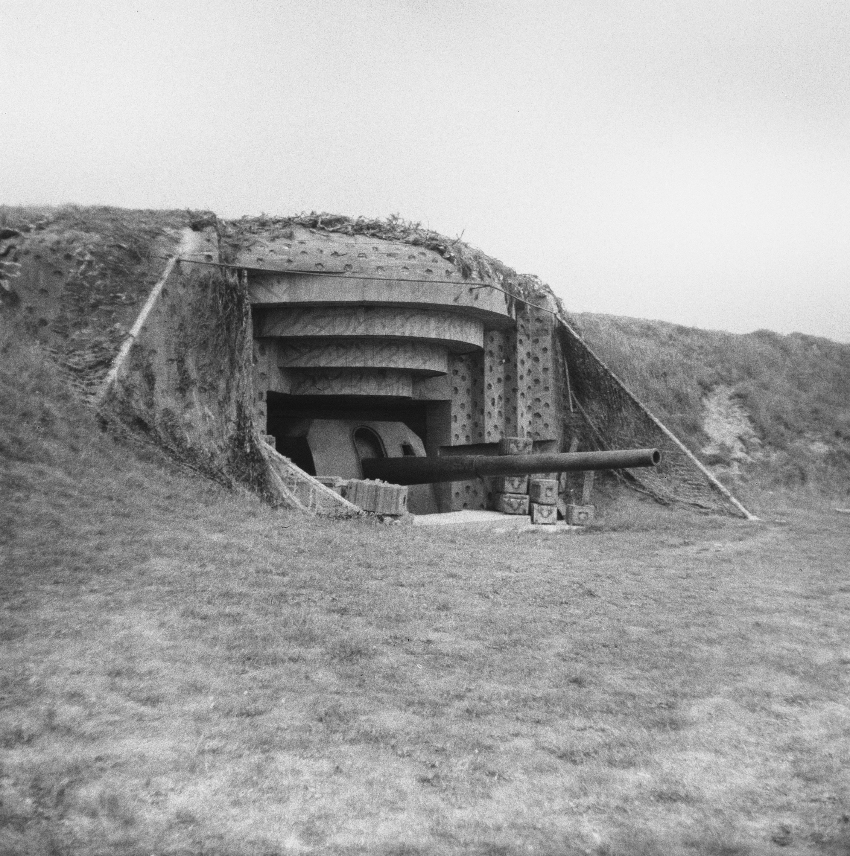 Collectie / Archief : Fotocollectie Anefo Reportage / Serie : Landmijnen ruimen bij Hoek van Holland Beschrijving : [serie Landmijnen ruimen bij Hoek van Holland] Annotatie : Een Duitse geschutsbatterij Datum : augustus 1945 Locatie : Hoek van Holland Trefwoorden : landmijnen, opruimingen, tweede wereldoorlog, wederopbouw Fotograaf : Ham, Piet van der / Anefo Auteursrechthebbende : Nationaal Archief Materiaalsoort : Negatief (zwart/wit) Nummer archiefinventaris : bekijk toegang 2.24.01.03 Bestanddeelnummer : 900-6438